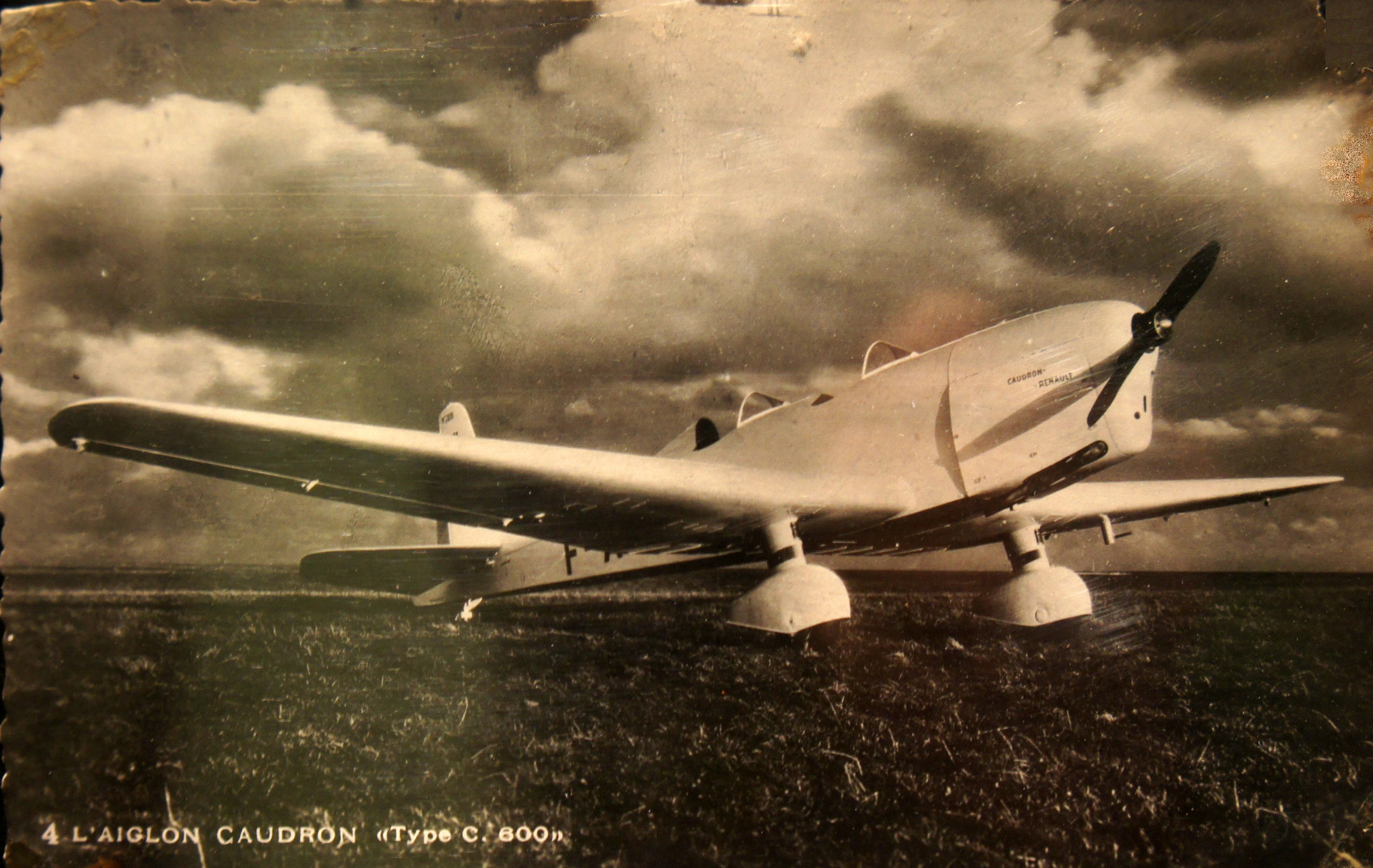 au Musée du terrain Vraux-Condé, collection de carte postale Abott.